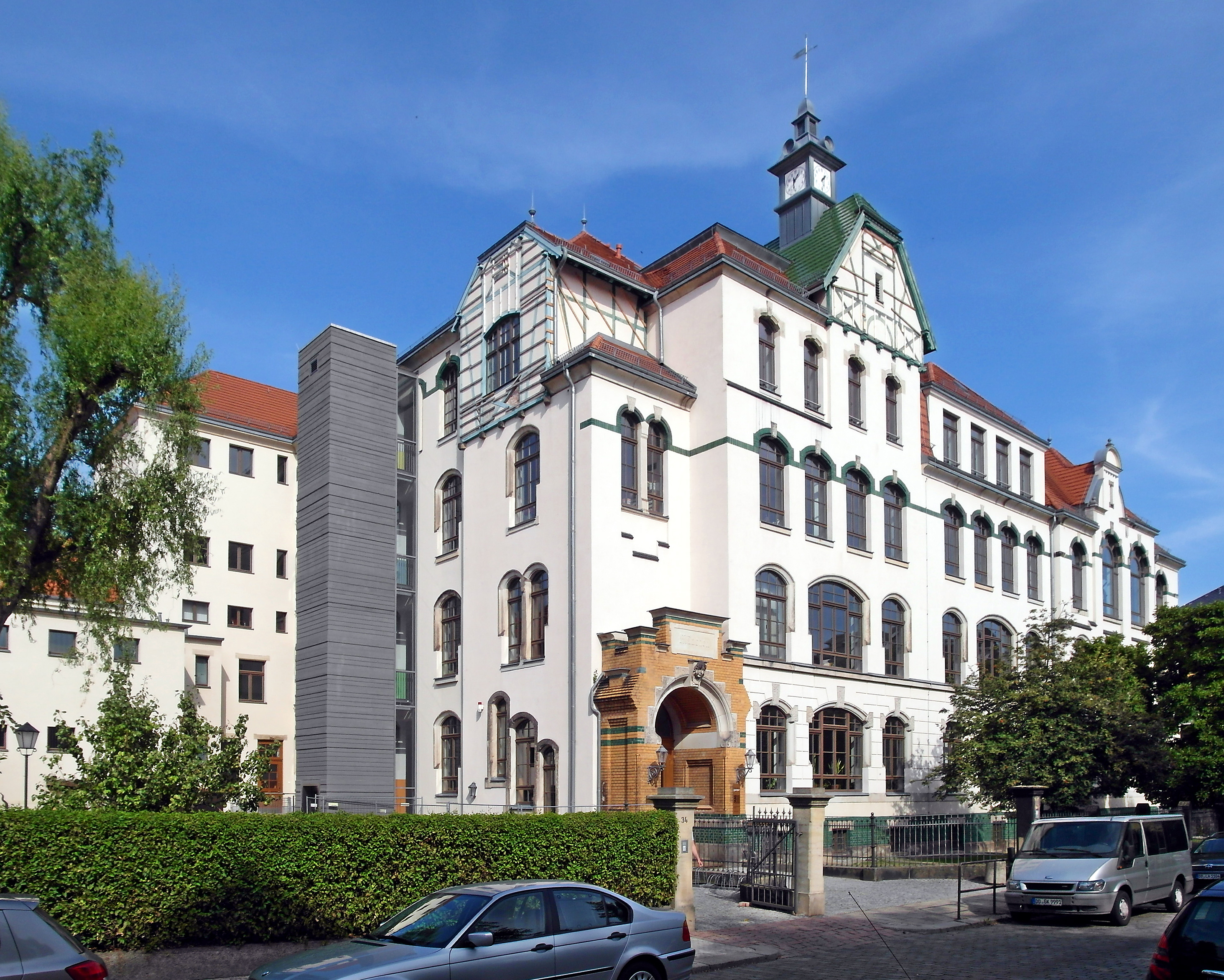 25.09.2016 01159 Dresden-Löbtau: 36. Oberschule Löbtau, Emil-Ueberall-Str. 34 (GMP: 51.043471,13.689825). Das Gebäude bildet eine bauliche Einheit mit der 37. Grundschule auf der Stollestraße 43. Hier der Baukörper Emil-Ueberall-Str. 34. Gründerzeitbau von 1902. Nach fast sieben Jahren Sanierung sind die einstige 36. Mittelschule, nun 36. Oberschule und die 37. Grundschule seit August 2009 wieder im Schulbetrieb. [SAM7885.JPG]20160925310DR(c)Blobelt